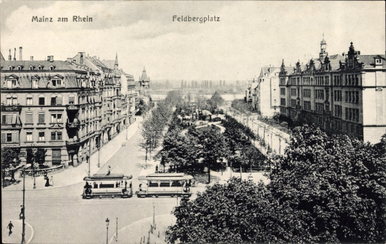 Der Feldbergplatz in Mainz-Neustadt 1909